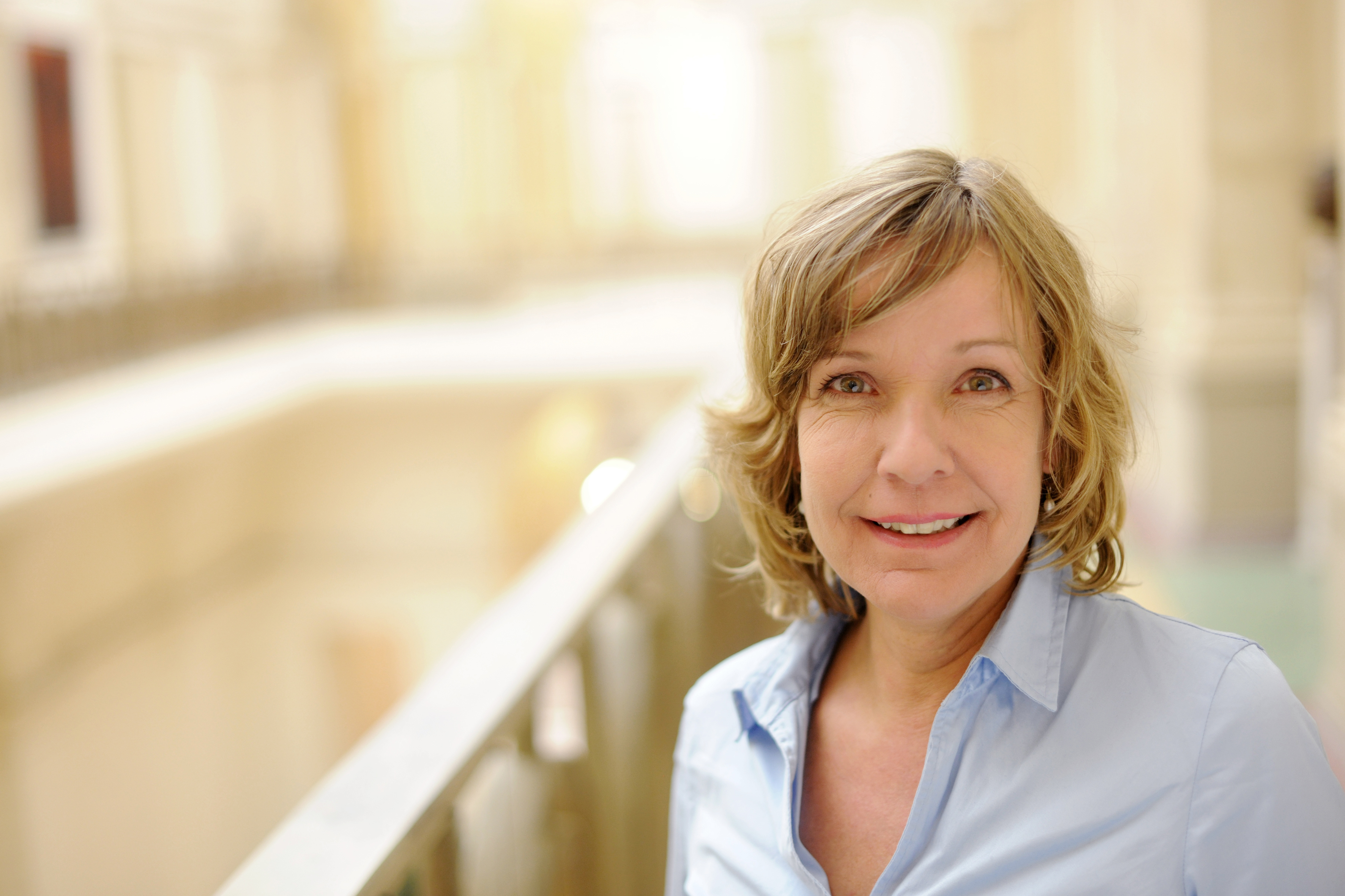 Catherina Pieroth-Manelli, Abgeordnete der Grünen-Fraktion Berlin